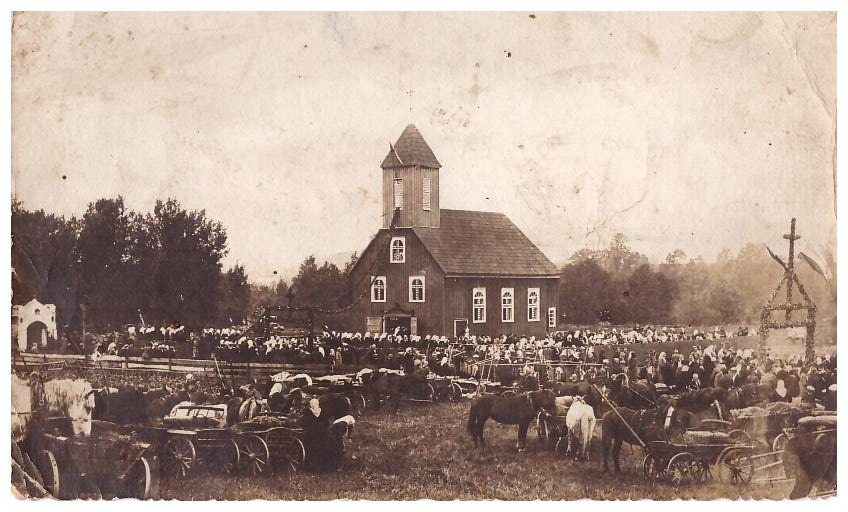 Bažnyčios šventinimo metu